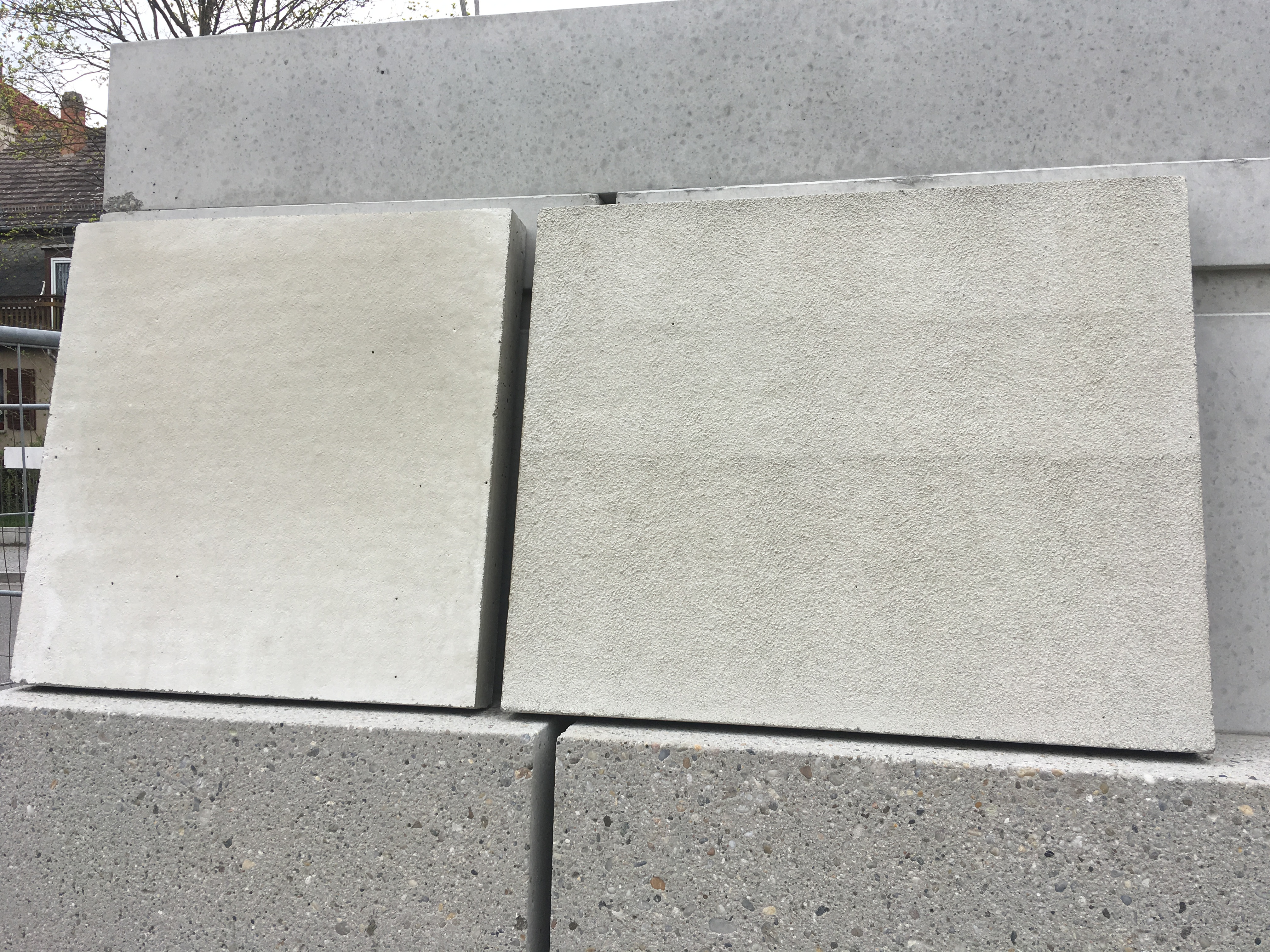 Bauherrin: Klassik Stiftung Weimar Architektur: Prof. Heike Hanada und Benedict Tonon, Berlin Ausstellungsfläche: 2.250 m² Vorgesehene Gesamtkosten: 22,6 Mio. Euro Bauzeitraum: 2015 bis Ende 2018 Sichtbetonfassade: Hemmerlein Ingenieurbau GmbH, Bodenwöhr